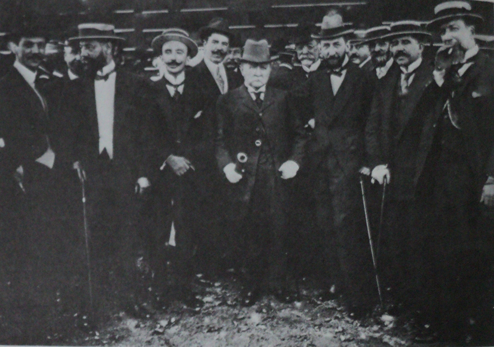 Ramón Barros Luco inaugura una exposicion de la Sociedad Nacional de Agricultura